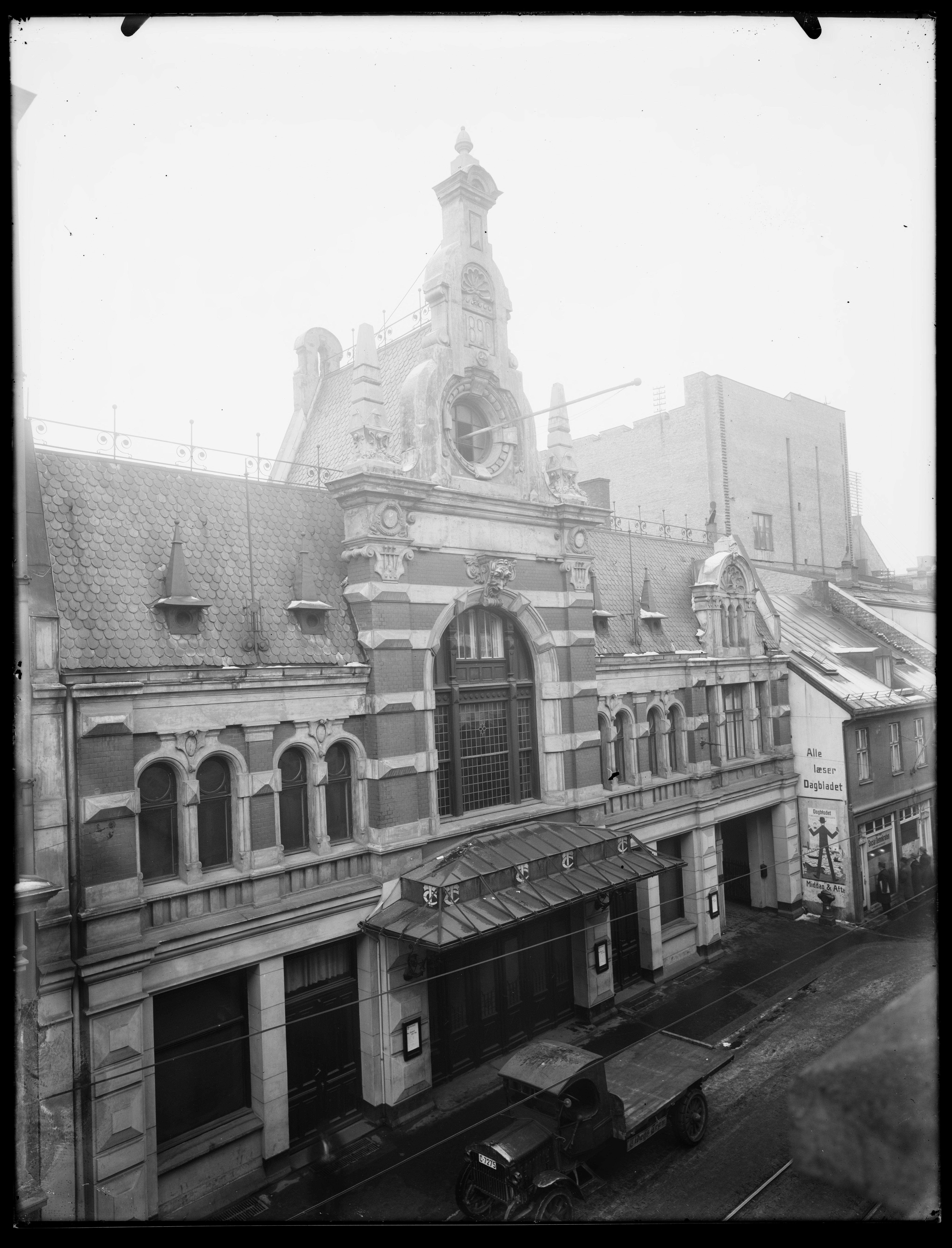 Bildet er hentet fra Nasjonalbibliotekets bildesamling. Anmerkninger til bildet var: Påskrift arkivark: Central Teatret, Facaden Eldste arkivnummer: 870 Oslo, Oslo, Oslo